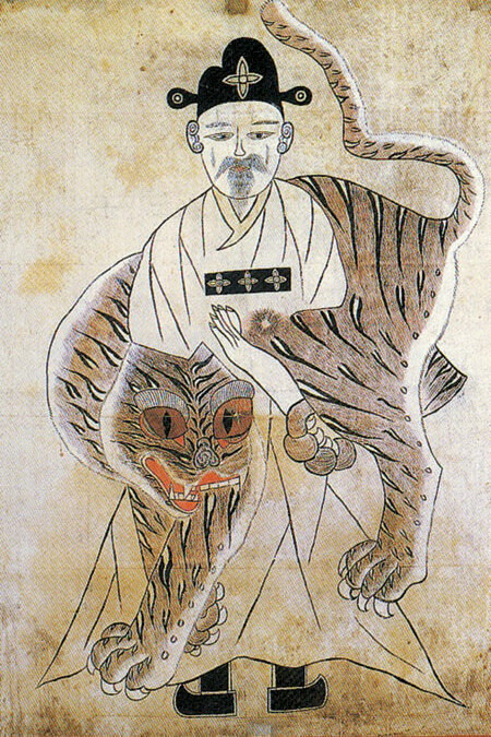 민화 - 산신도